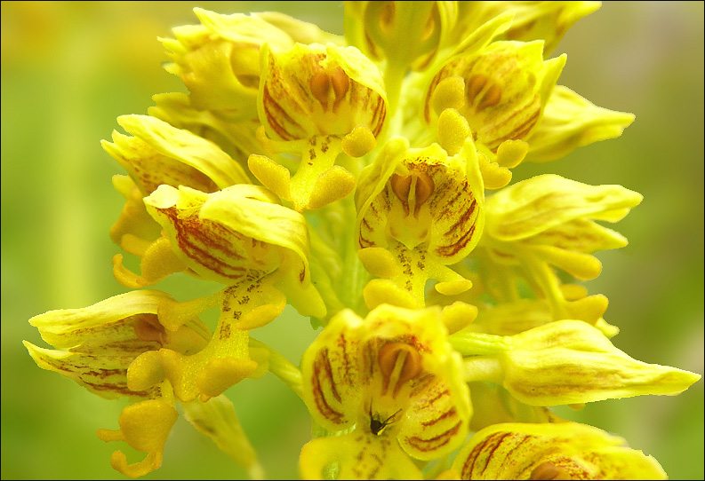 Макро соцветия ятрышника мелкоточечного. 17 апреля 2010, окрестности Новороссийска